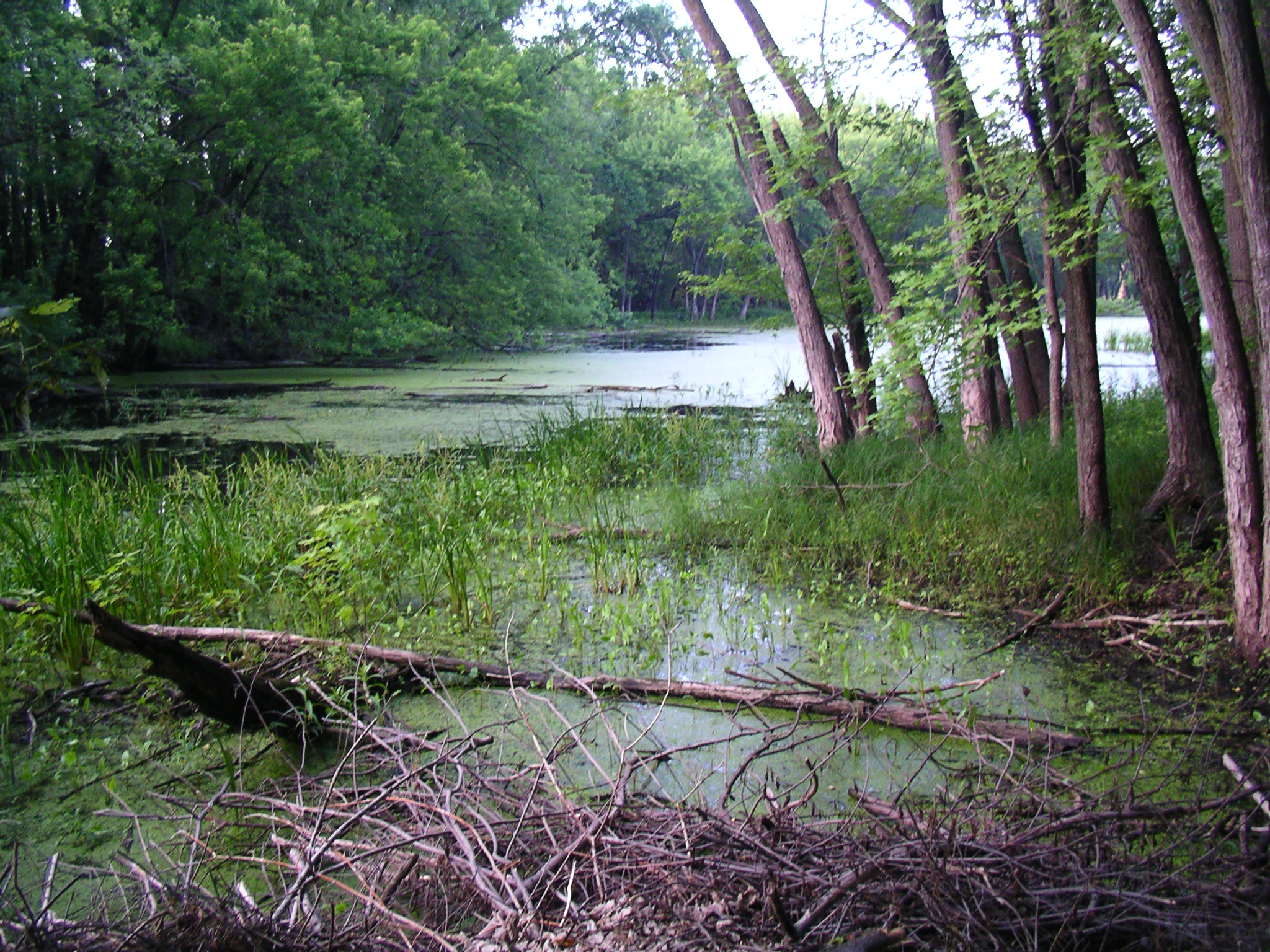 Pierce County Islands State Public Hunting Area in den Mississippi-Auen südlich von Hager City, Wisconsin